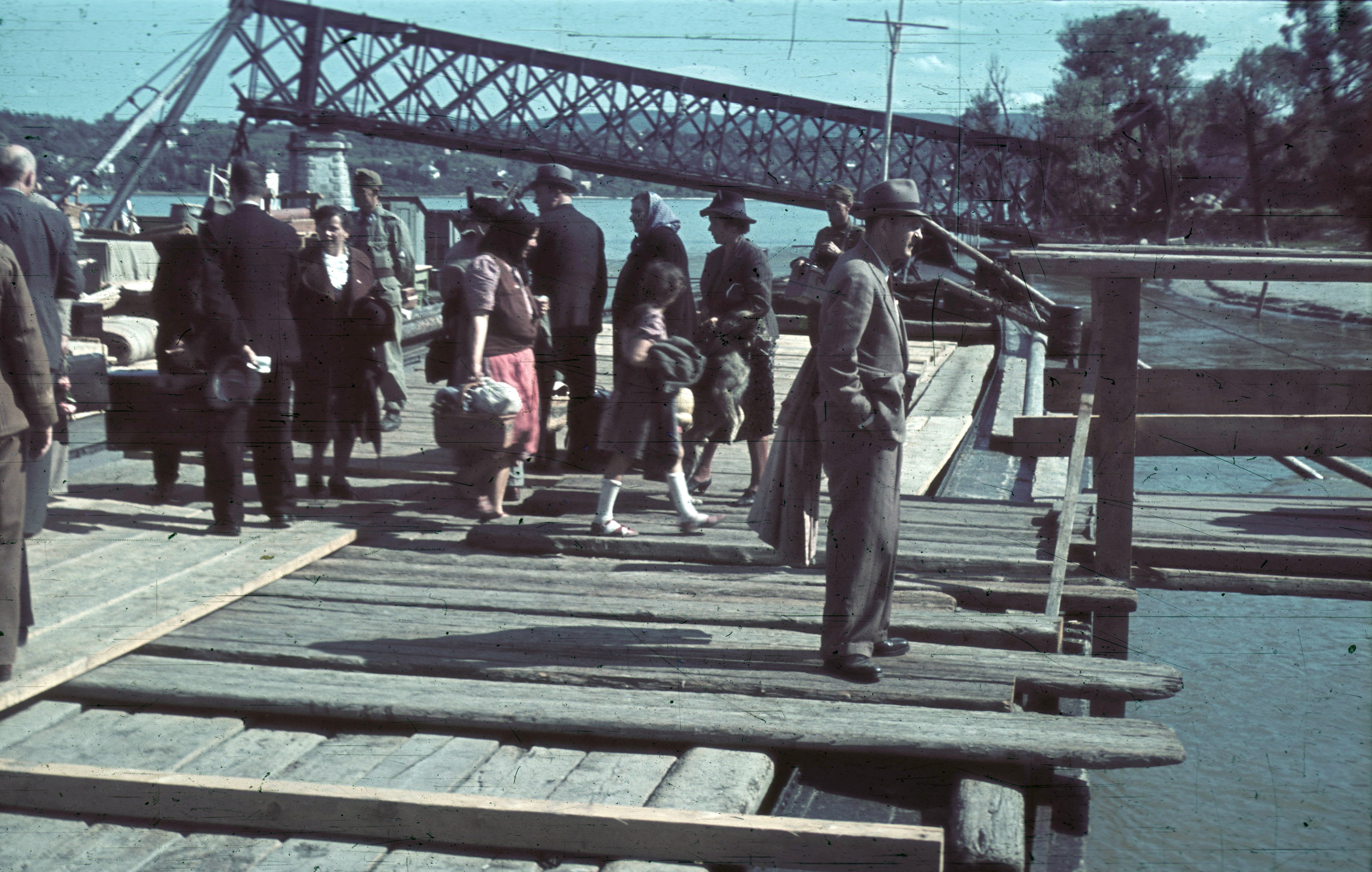 kikötő a Dunán, háttérben a lerombolt vasúti híd. Location: Serbia, Novi Sad Tags: colorful, wrecked bridge Title: kikötő a Dunán, háttérben a lerombolt vasúti híd.